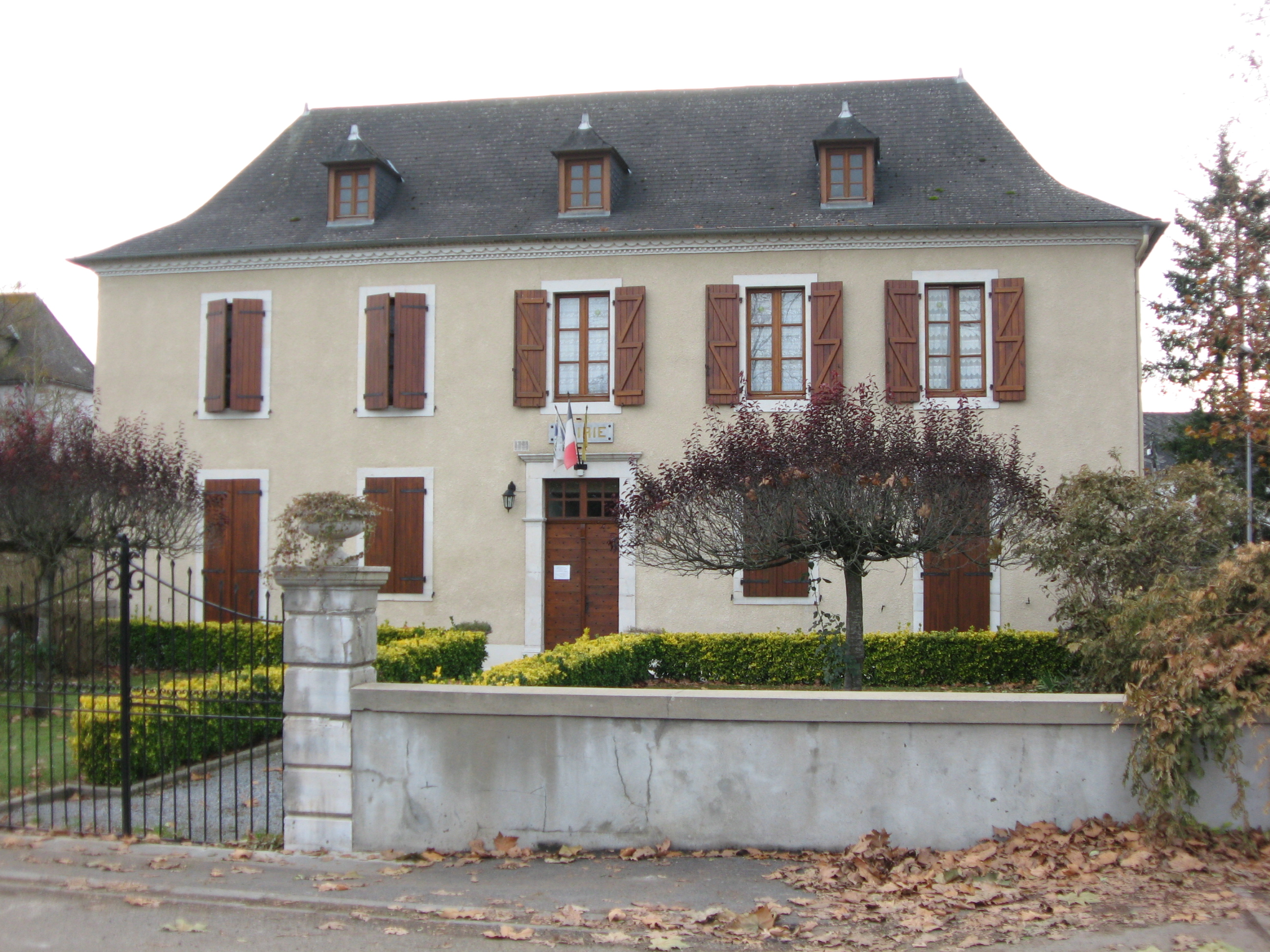 Mairie de Gurs (Pyrénées-Atlantiques) (Pyrénées).